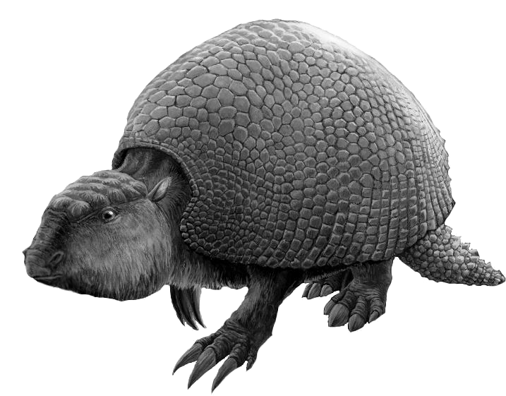 Glyptodon (ou glyptodonte) : tatou géant qui vécut durant le pléistocène en Amérique du Sud